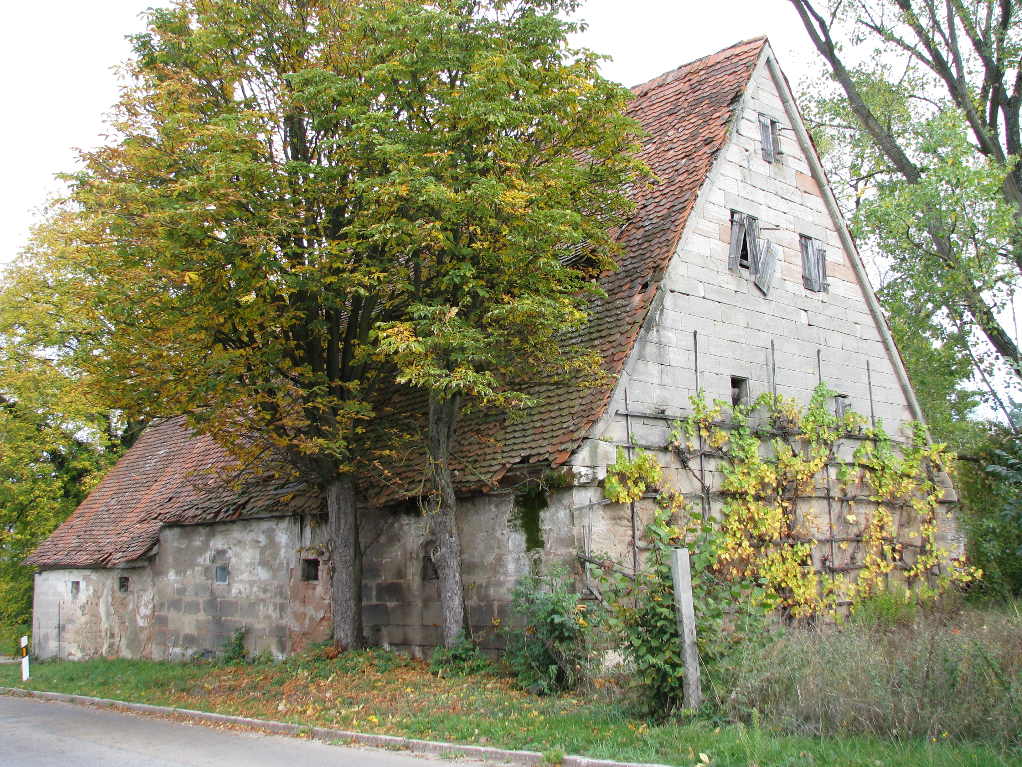 Rudletzholz, Gemeindeteil von Heideck im mittelfränkischen Landkreis Roth, altes Anwesen im Dorf